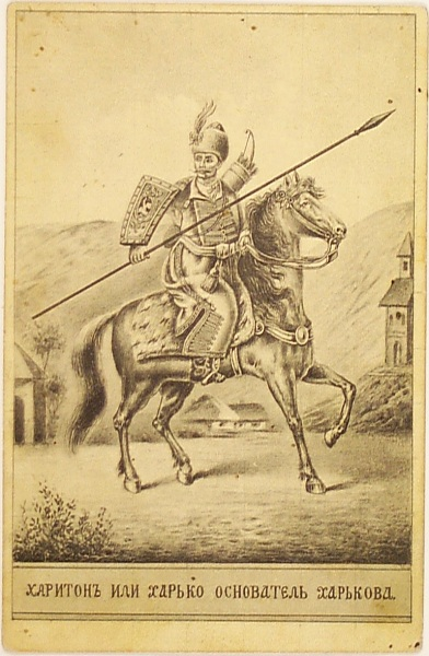 Міфічний козак Харко, за легендою вважається засновником міста Харкова. Дореволюційна відкрита поштівка.